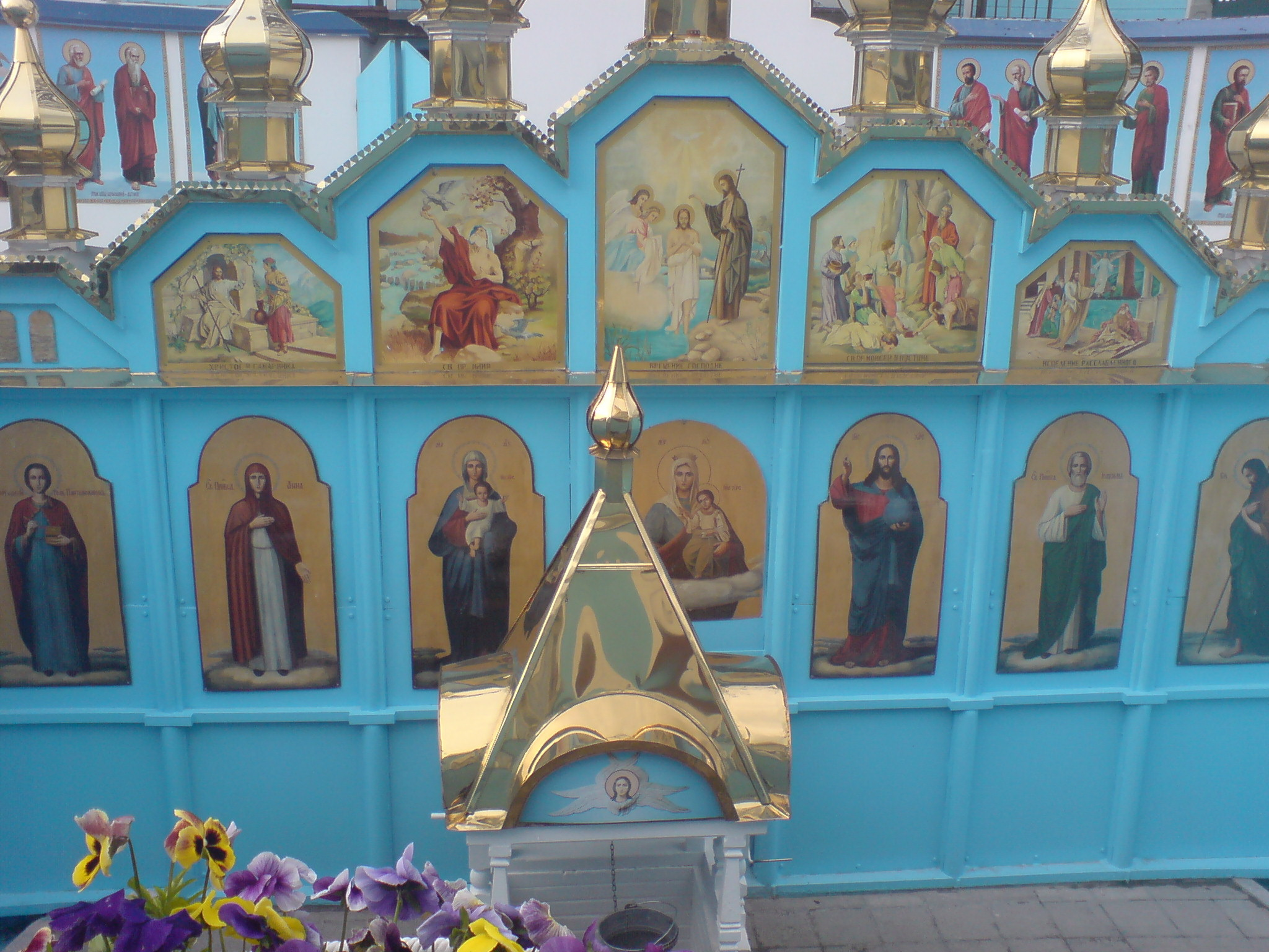 Криниця джерела Святої Анни біля села Онишківці Дубенського району Рівненської області.